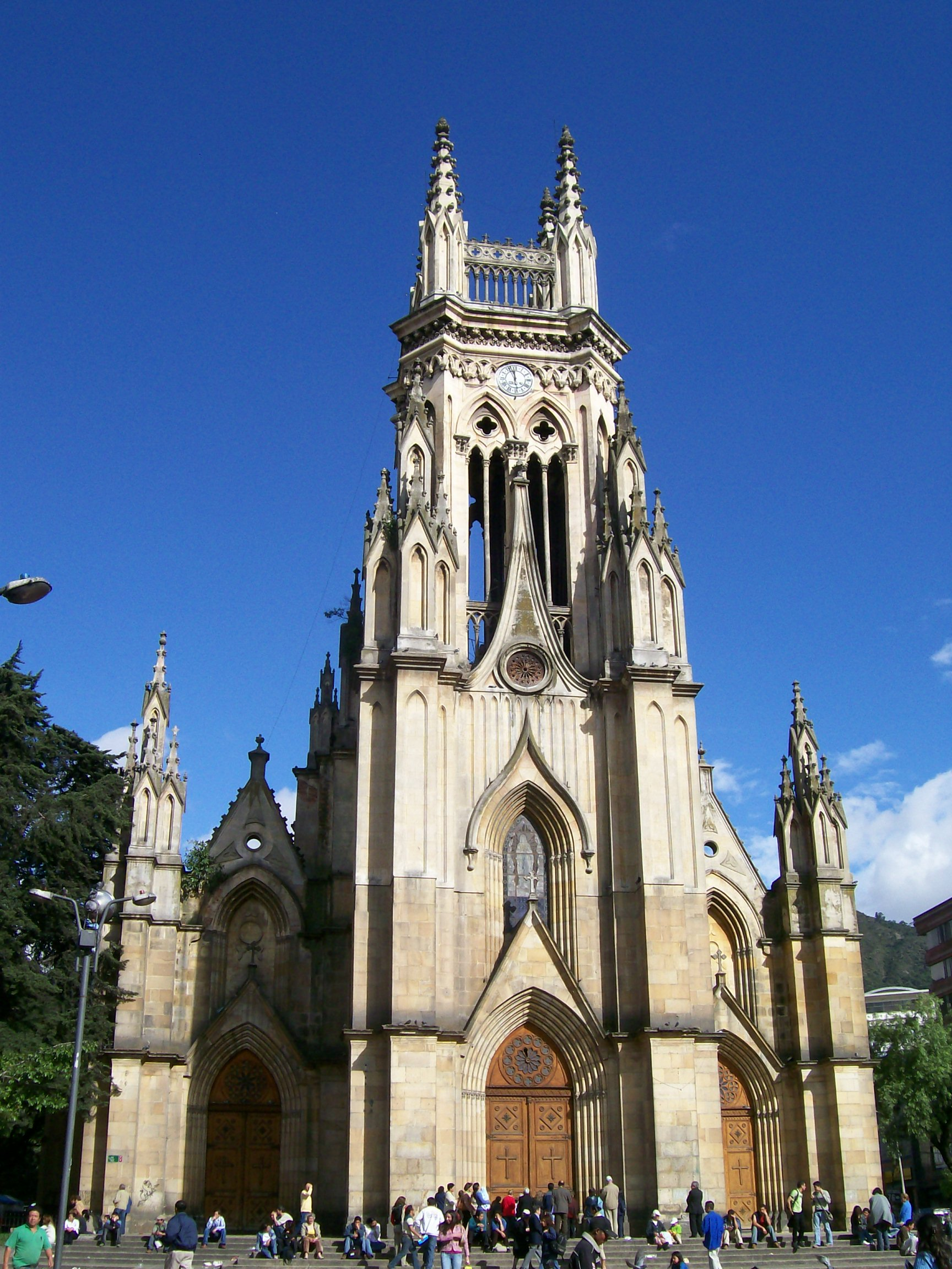 Catedral de Nuestra Señora de Lourdes